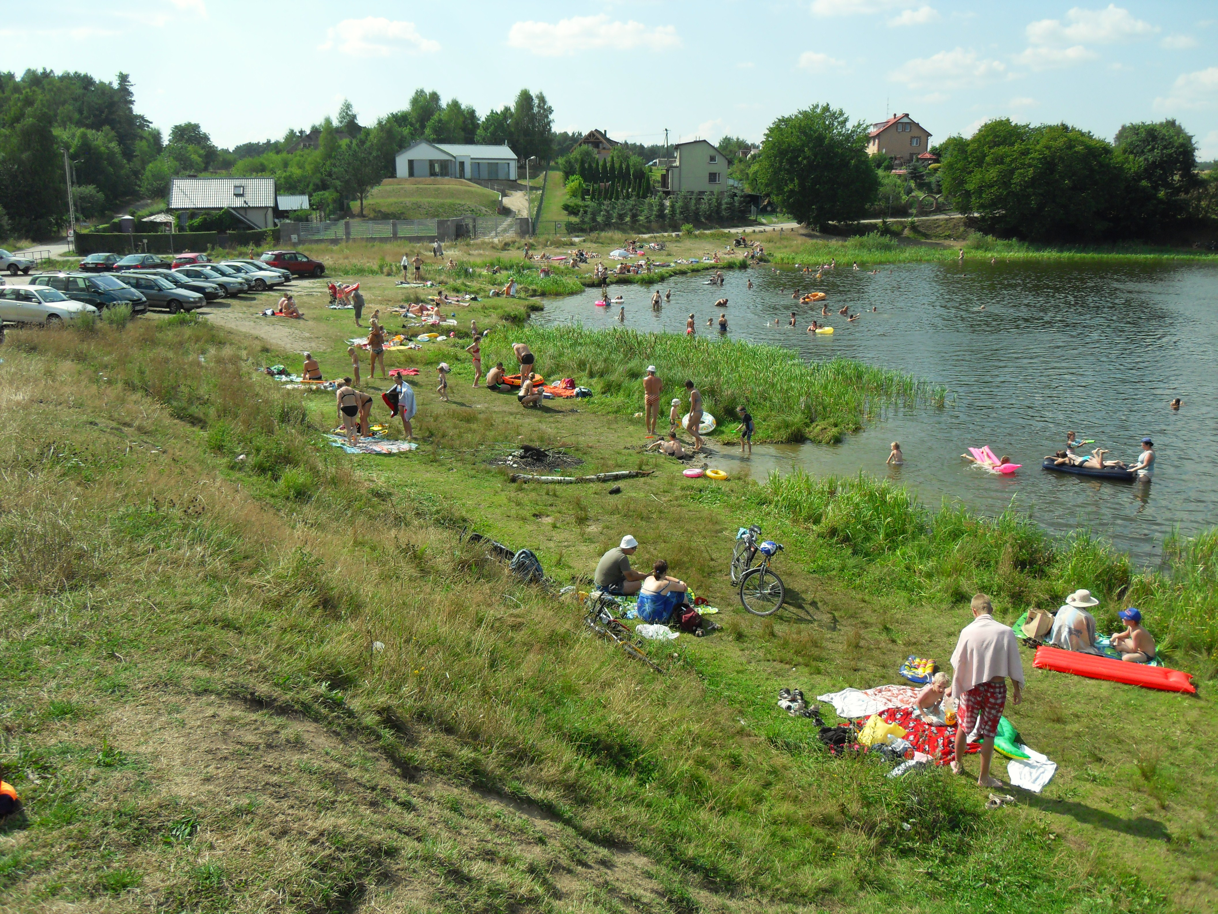 Jezioro Wysockie w Gdańsku, kąpielisko.